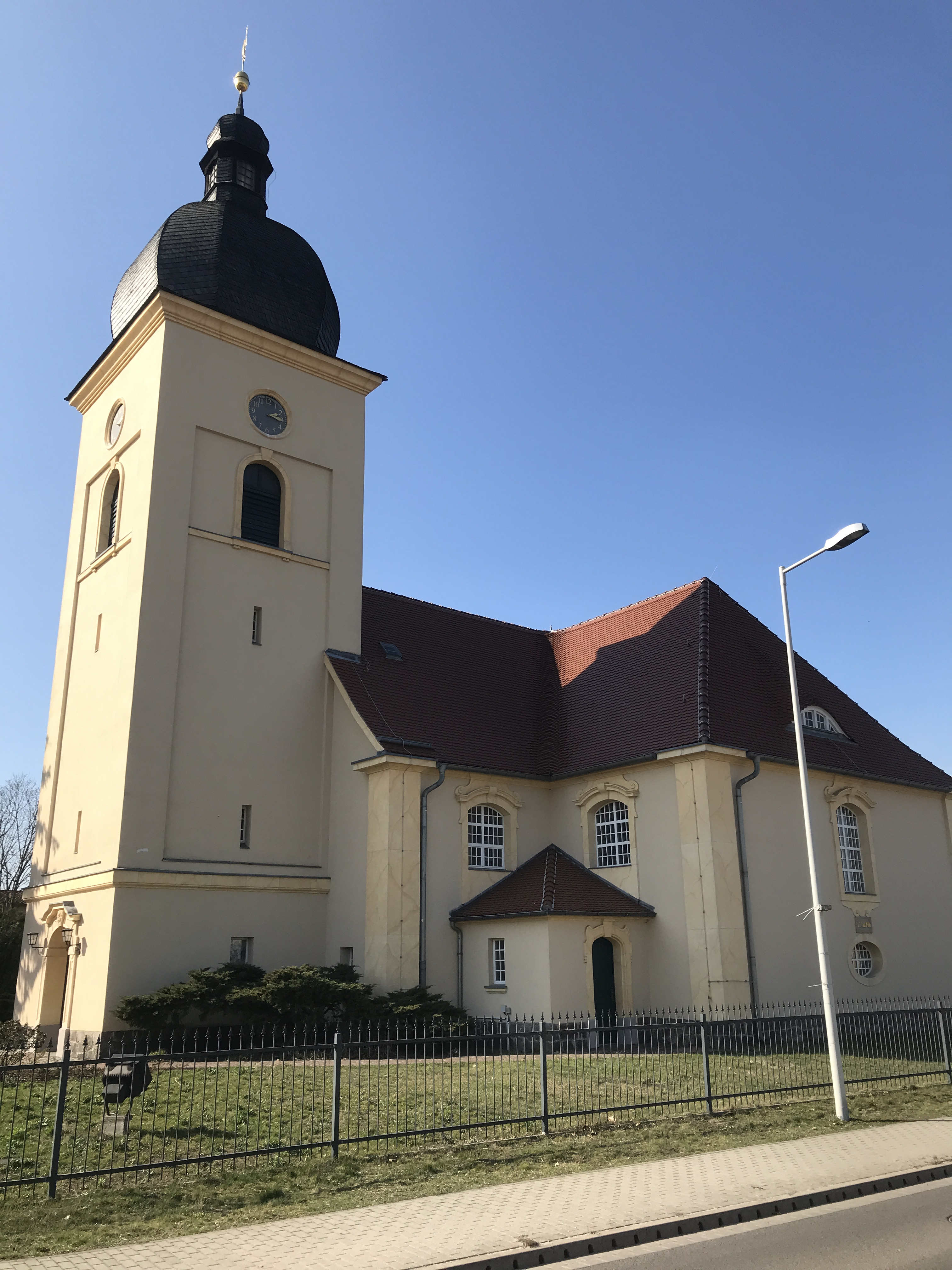 Die Dorfkirche Sielow ist eine neobarocke Saalkirche aus dem Jahr 1906 in Sielow, einem Ortsteil der Stadt Cottbus in Brandenburg.